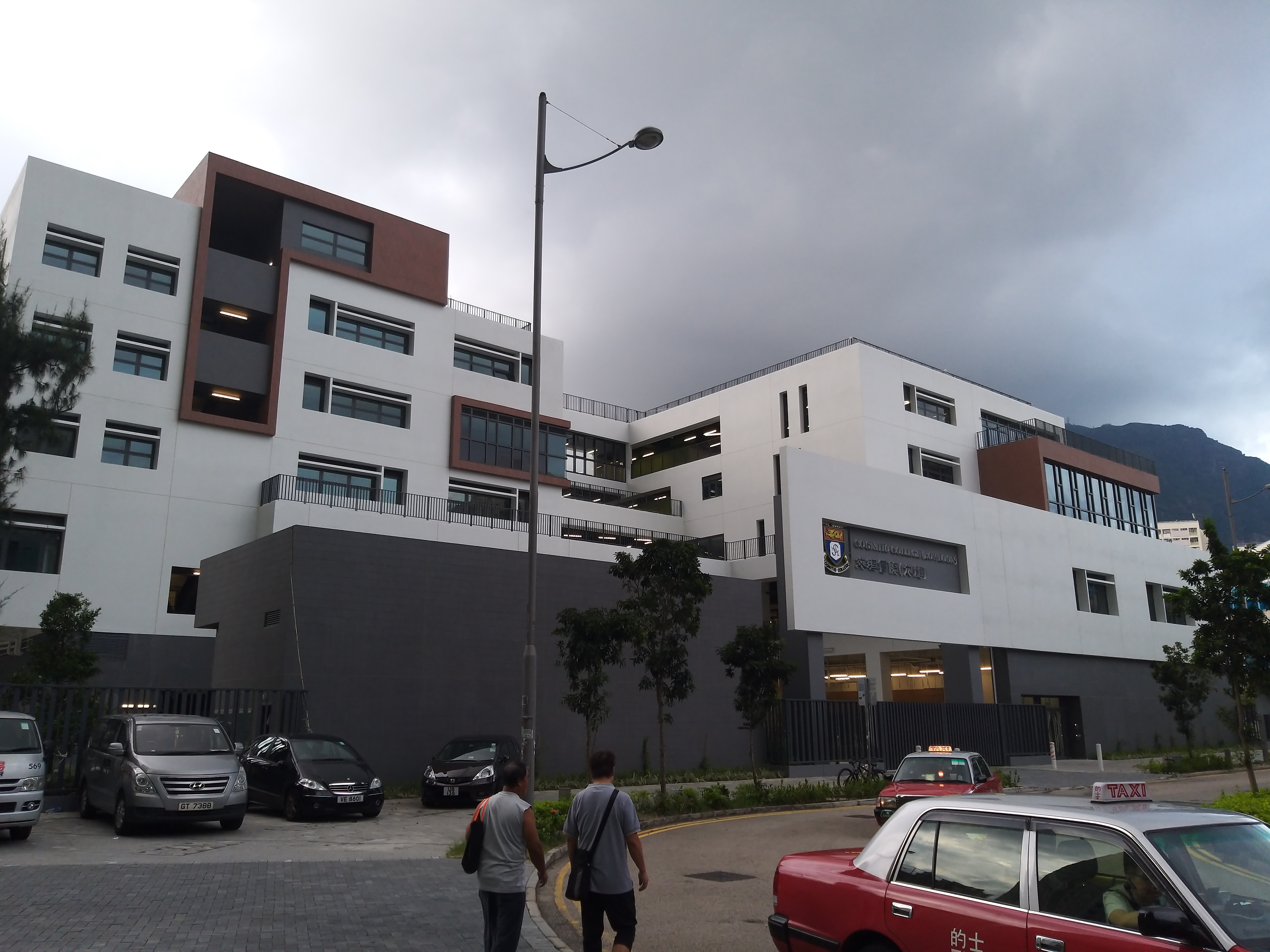 啟用前夕的文理書院（九龍）新校舍